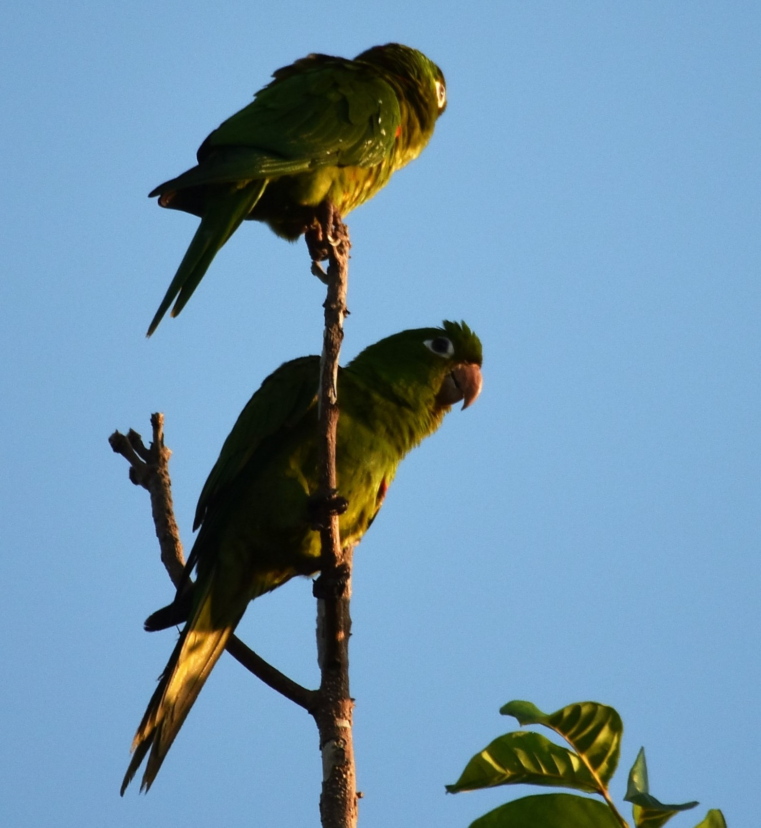 Haitisittich Psittacara chloropterus